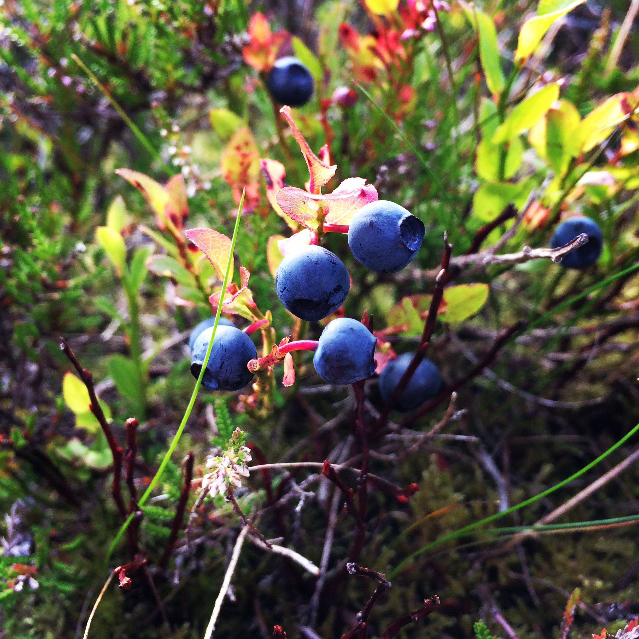 Llusi duon bach ar Fynydd Aberdâr.